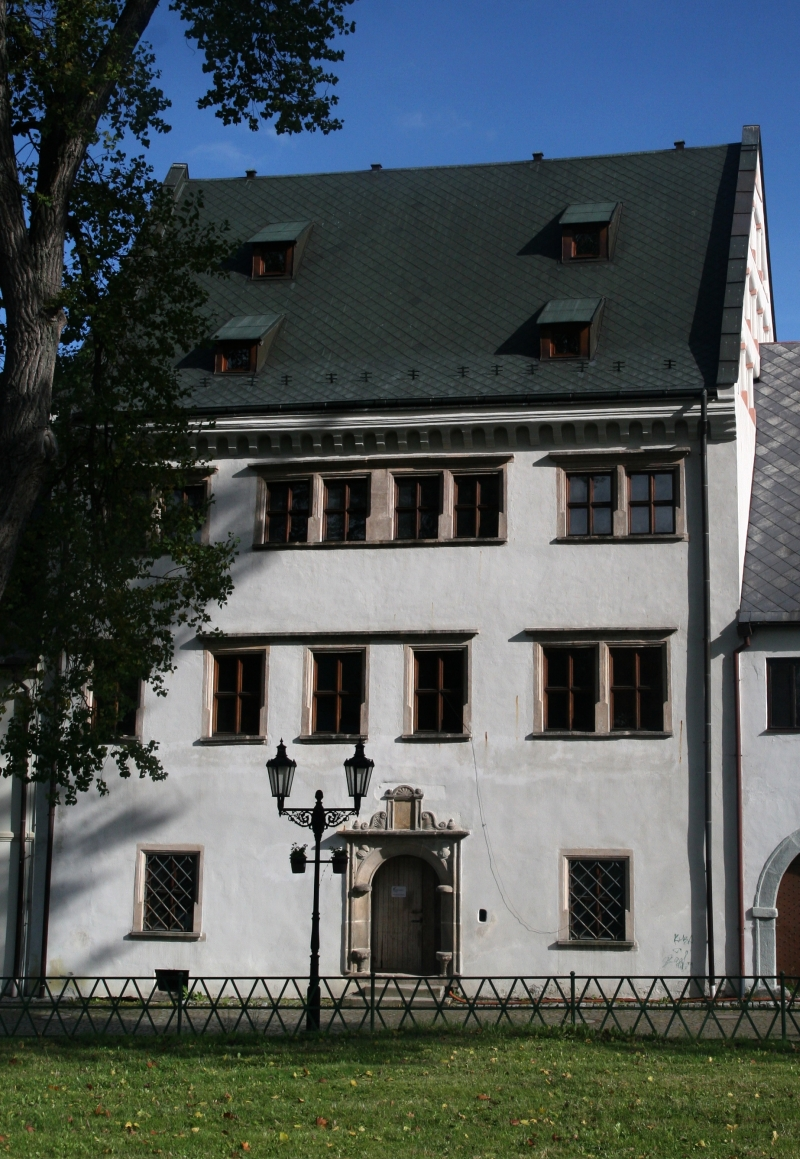 Pluhův dům